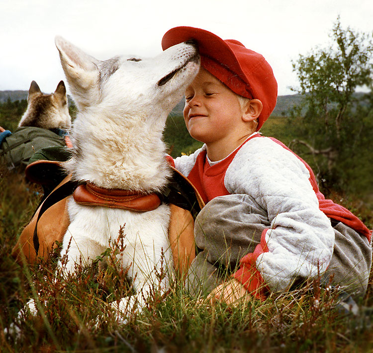 Packsaddle (Kløv på Siberian Husky)